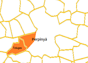 Mapa del Cantó de Perpinyà 6 elaborat a partir d'un mapa de lliure disposició